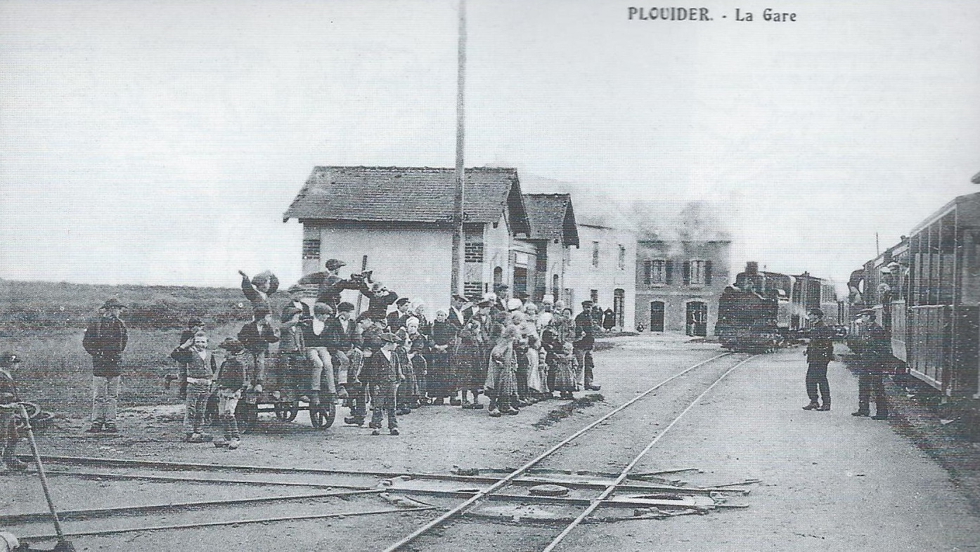 La gare de Plouider vers 1910 (carte postale, auteur inconnu).